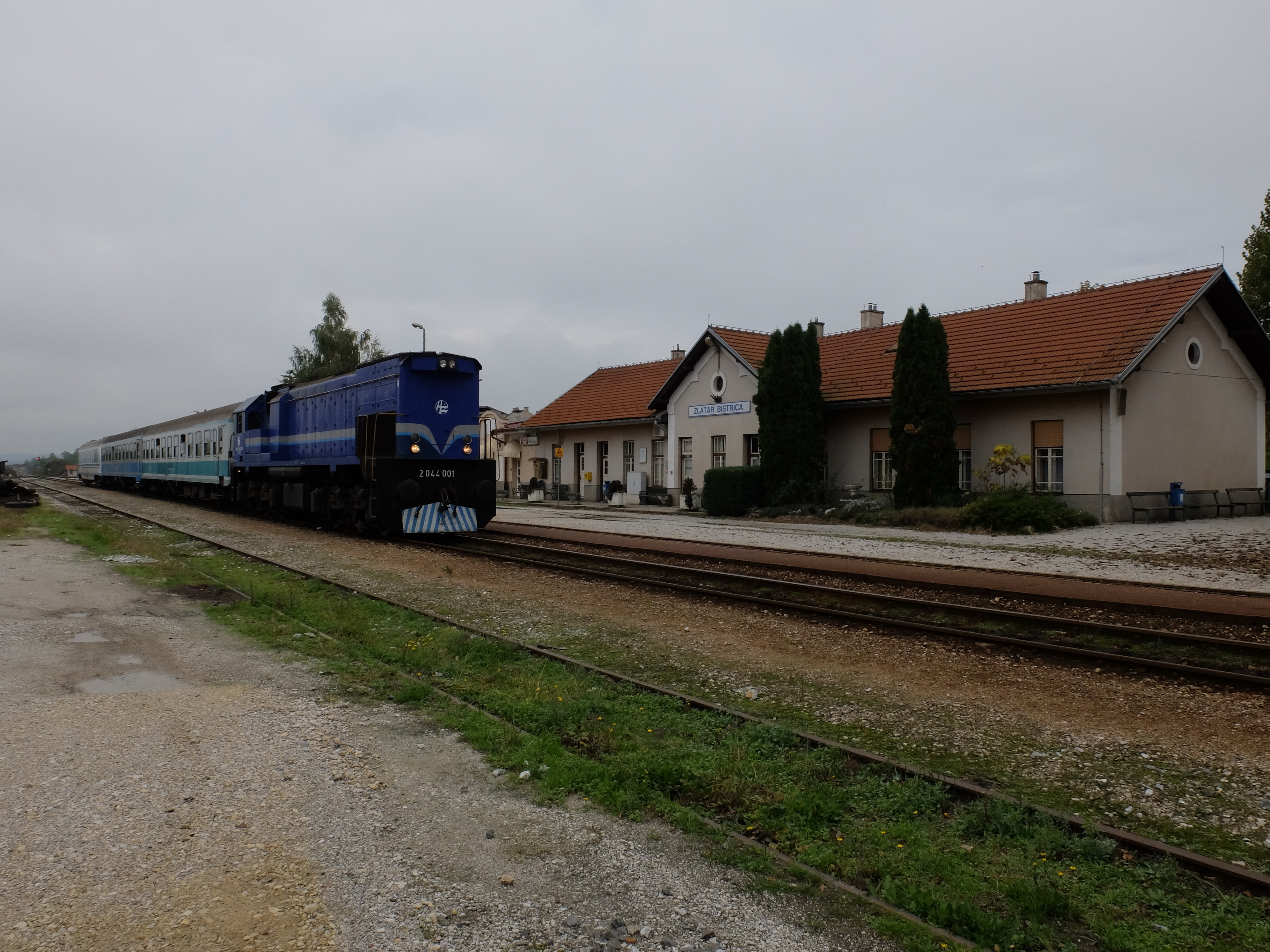 HŽ 2044 001 in Zlatar Bistrica